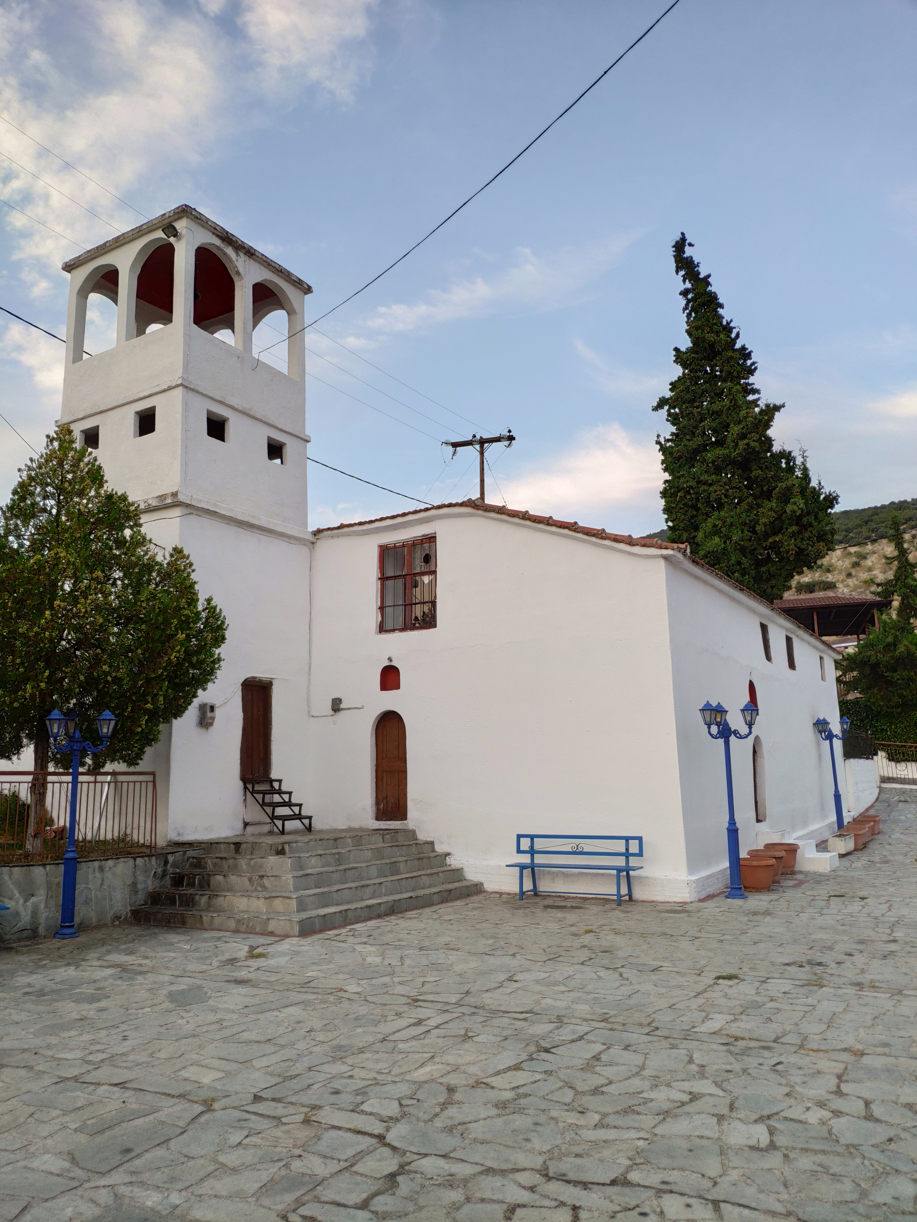 Ναός Αναλήψεως του Σωτήρος στο Θεοδωράκιο«Ναός Αναλήψεως του Σωτήρος στο Θεοδωράκιο»